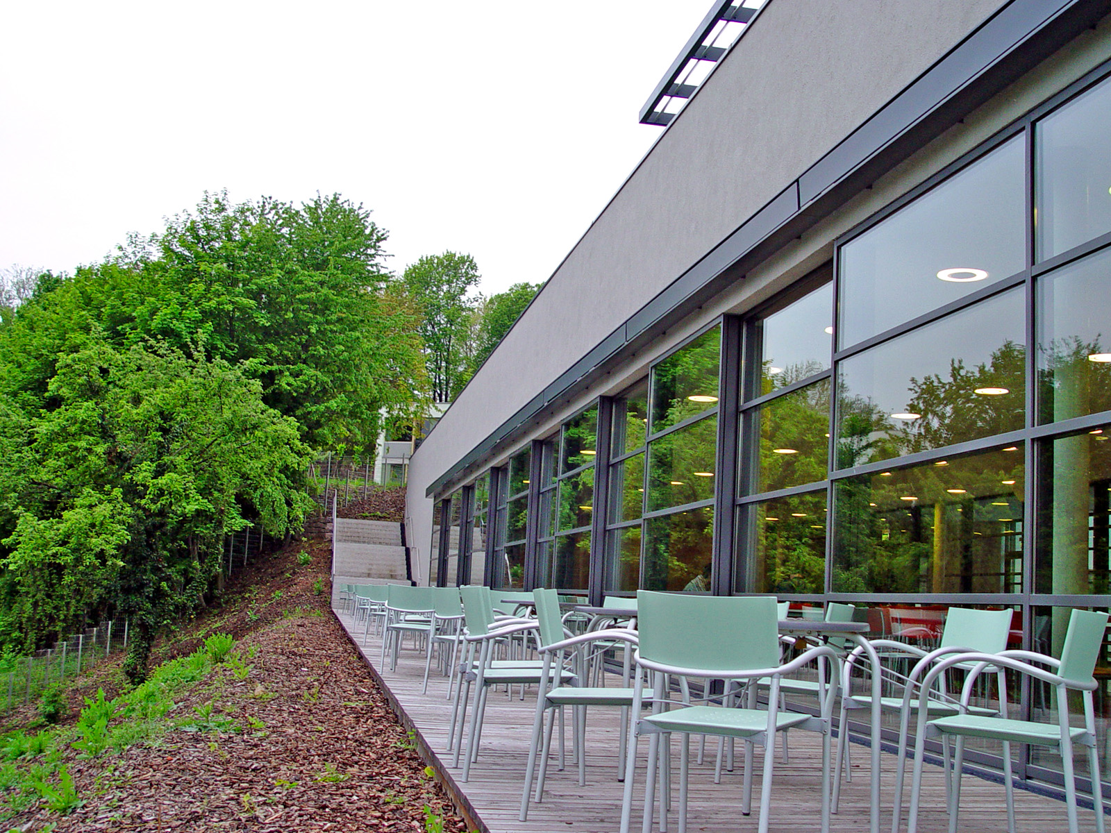 Sächsisches Landesgymnasium Sankt Afra, Mensa